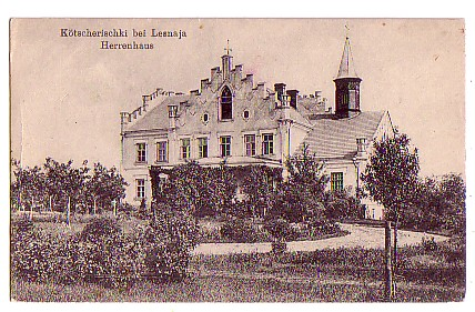 Беларуская (тарашкевіца): Паўлінава (Paŭlinava), сядзіба Бохвіцаў (Bochvic)